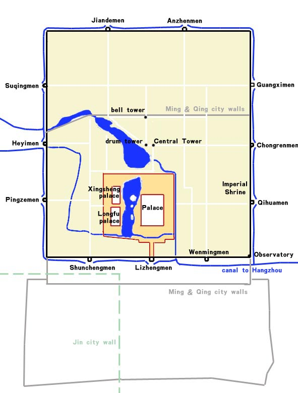 map of Cambaluk (大都)